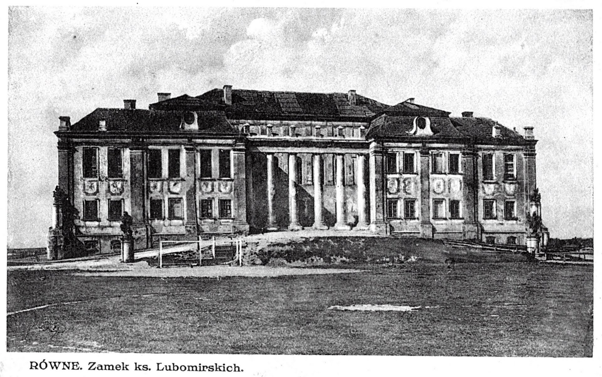 Pałac Ludomirskich w Równem, zniszczony przez sowietów w roku 1945.